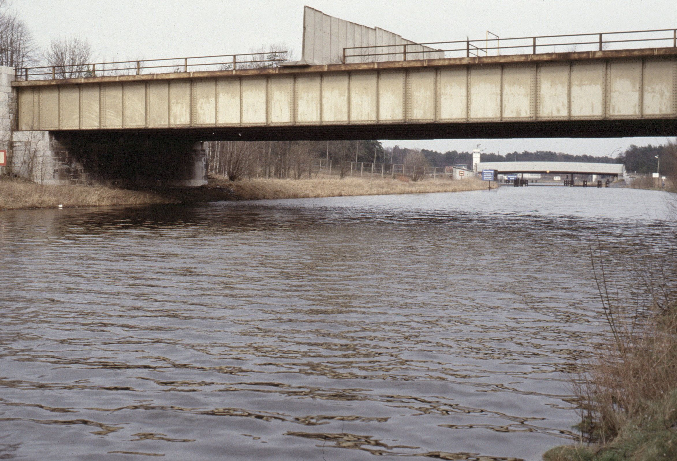 Autobahnbrücke Albrechts Teerofen